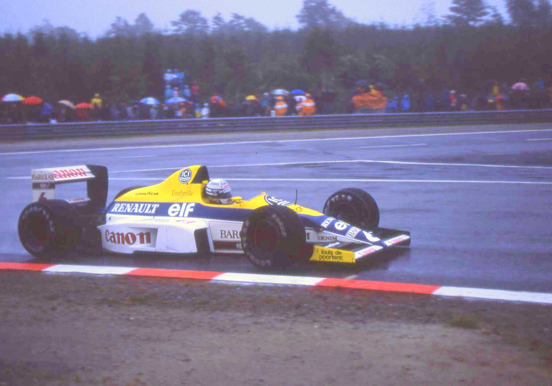 Riccardo Patrese - Williams-Renault. Scan diapo argentique.